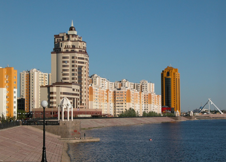 Nur-Sultan, Kazakhstan